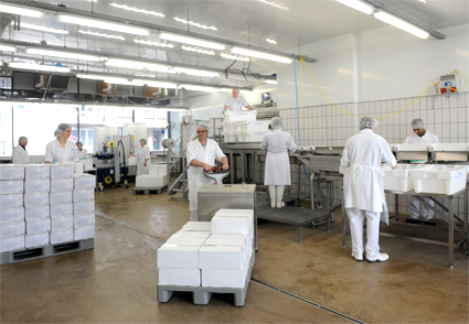 Fischmarkt Arbeiter